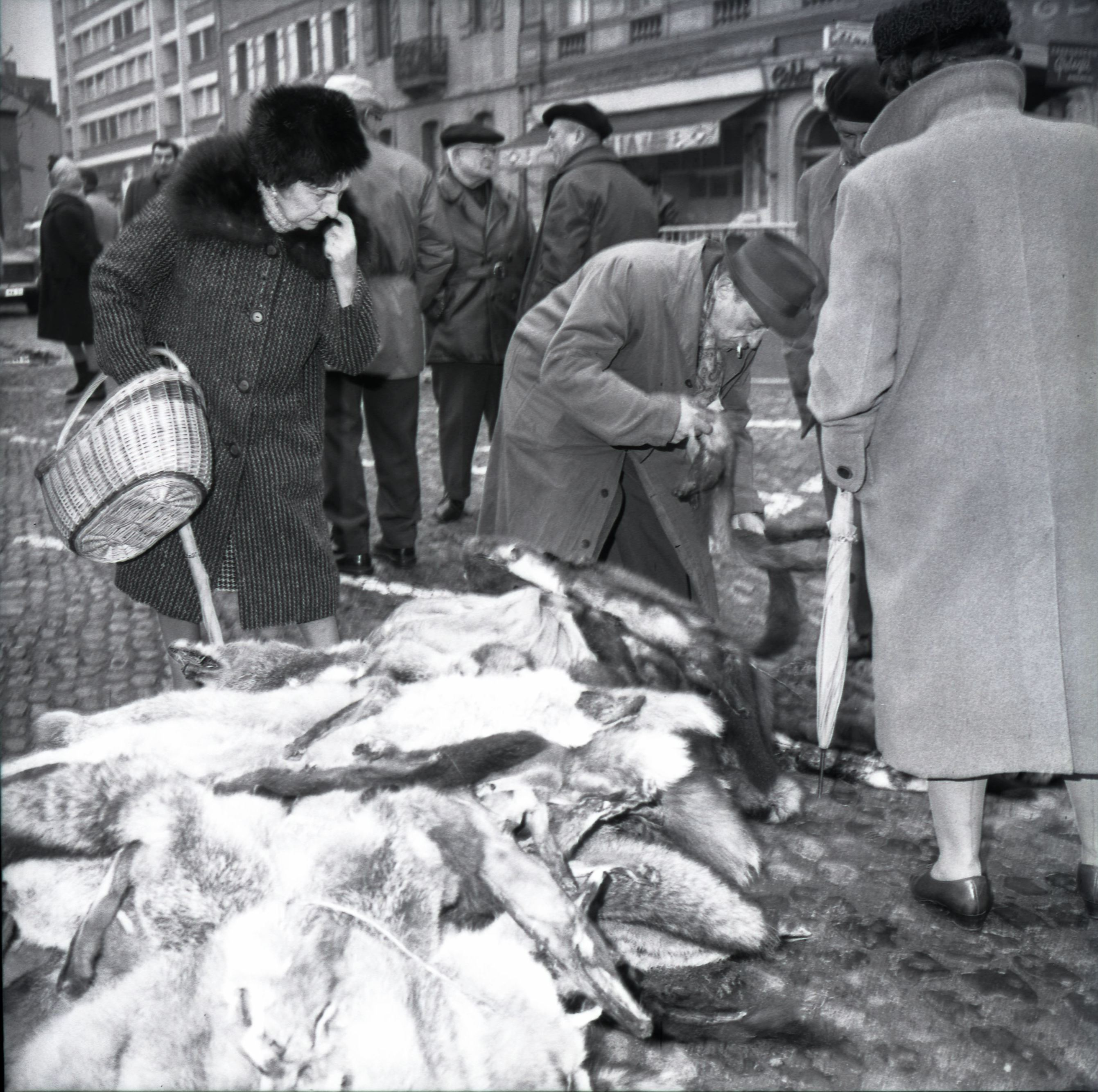 Place Dupuy. 6 mars 1965. Scène de marché (foire aux sauvagines) : plan rapproché sur les peaux et fourrures d'animaux ; au 2nd plan une dame avec son panier est penché dessus, un homme également penché regarde de plus près une peau ; en arrière-plan des passants discutent.